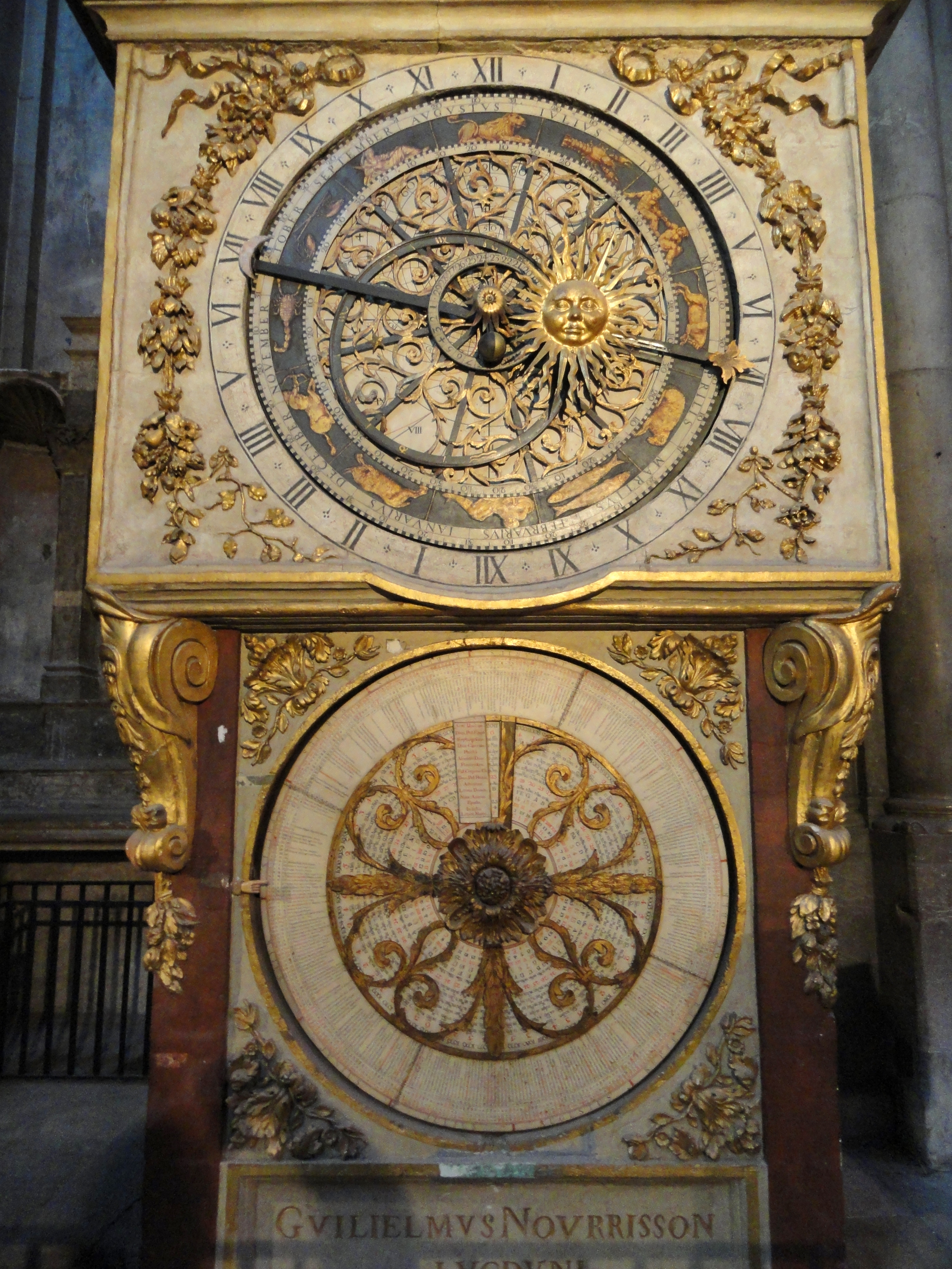 Horloge astronomique de la cathédrale Saint-Jean de Lyon, Lyon, France.